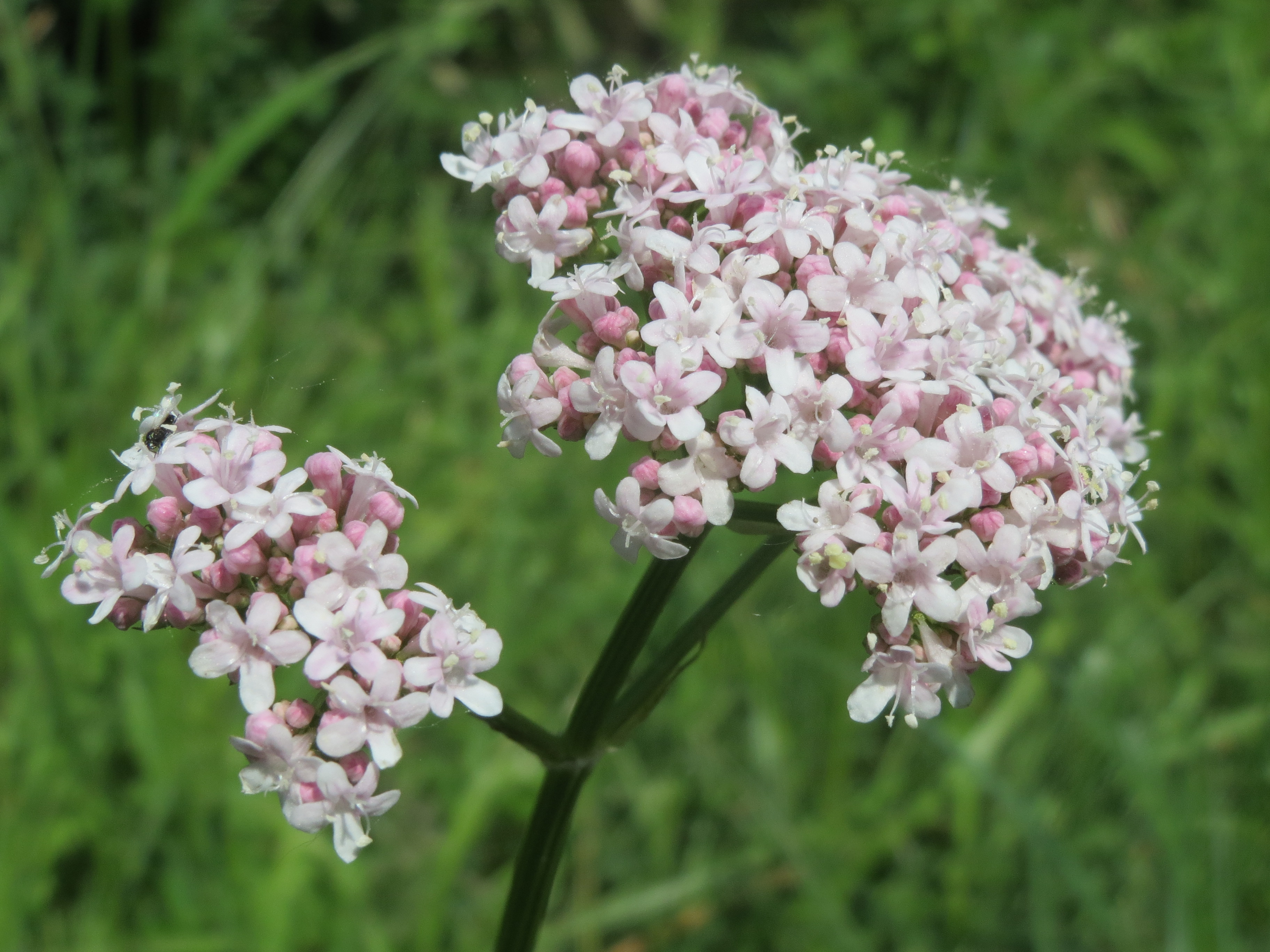 Echter Baldrian (Valeriana officinalis) im Hockenheimer Rheinbogen